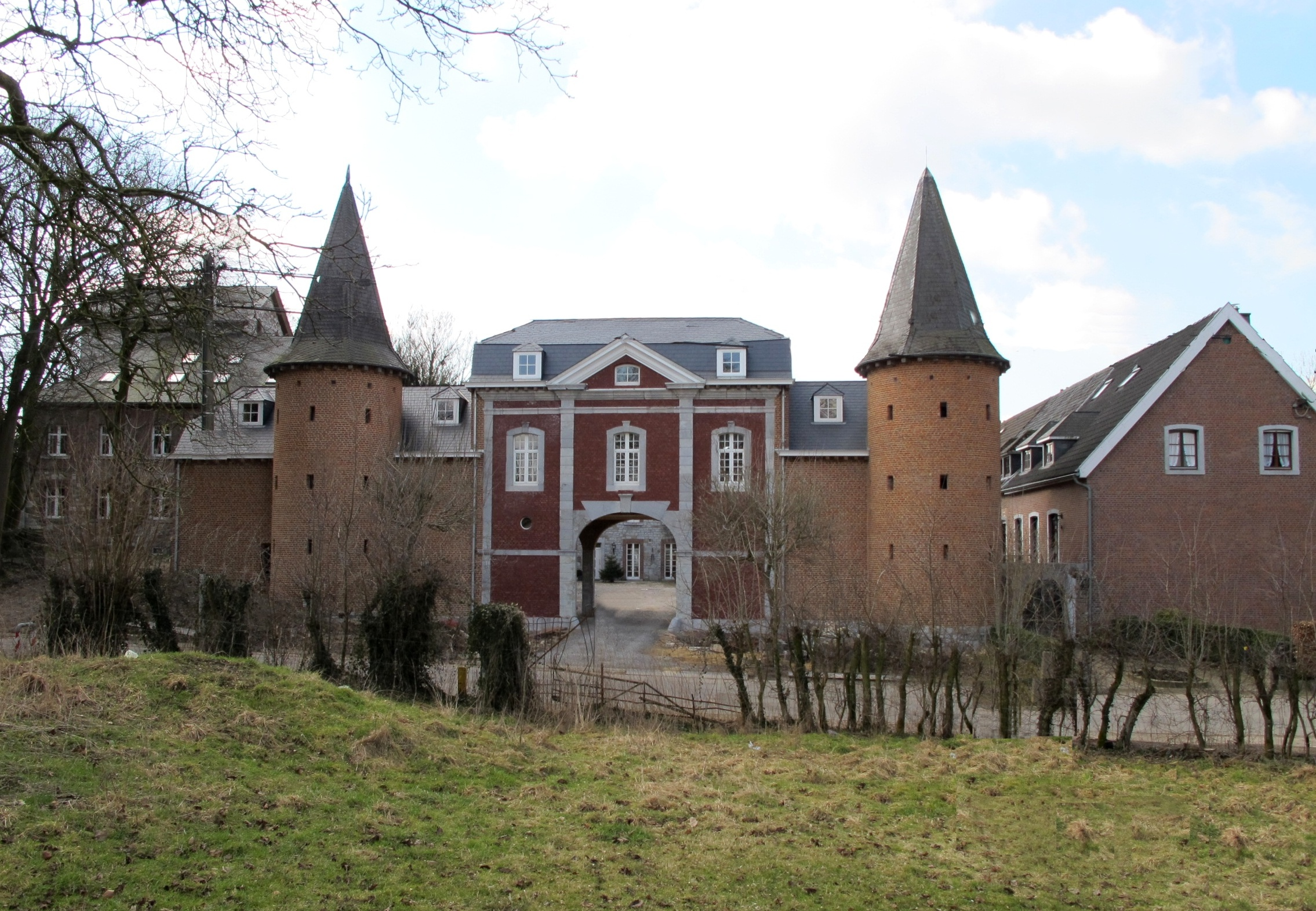 Burg Stockem in Eupen (Belgien)